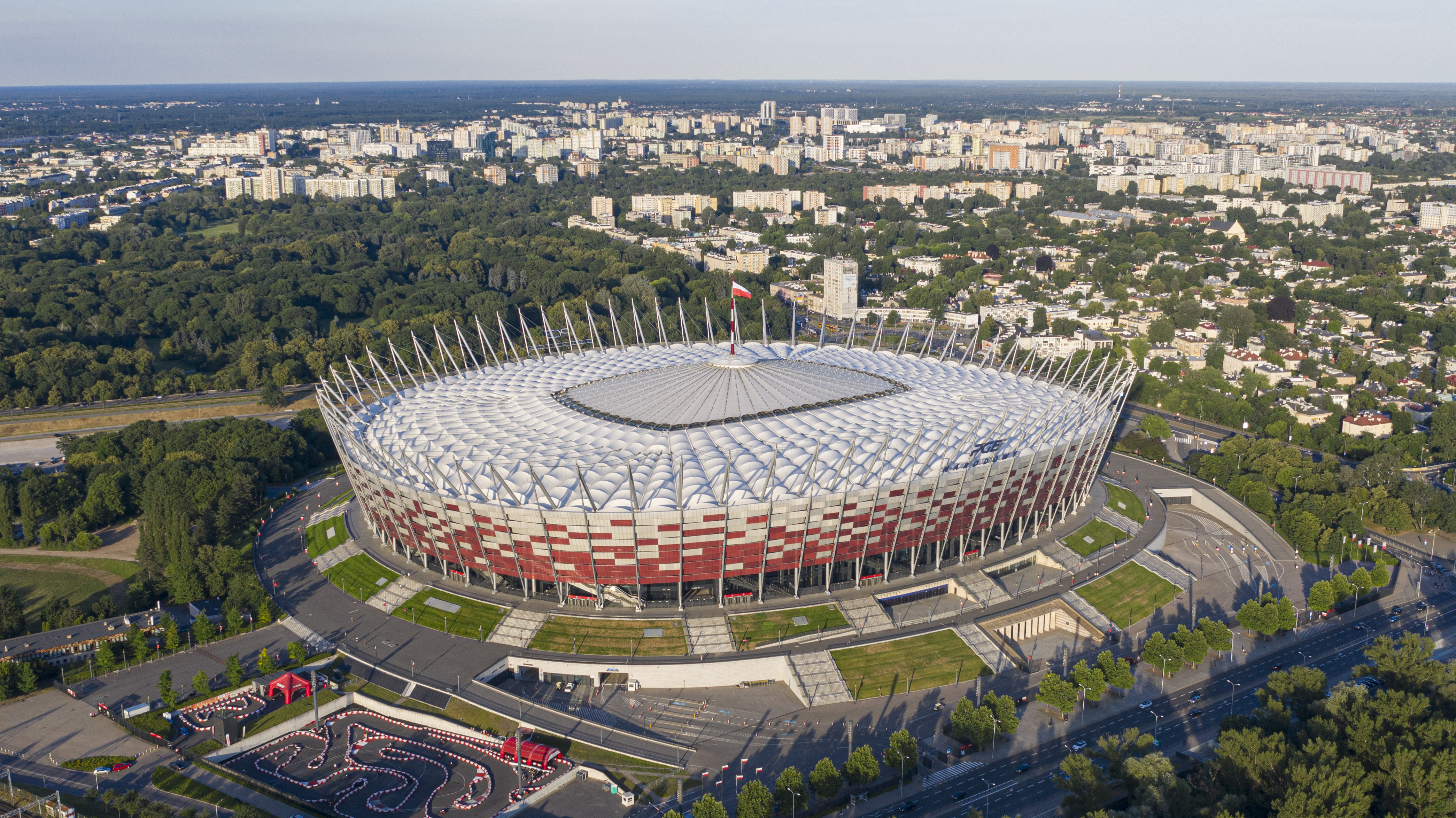 National Stadium Warsaw